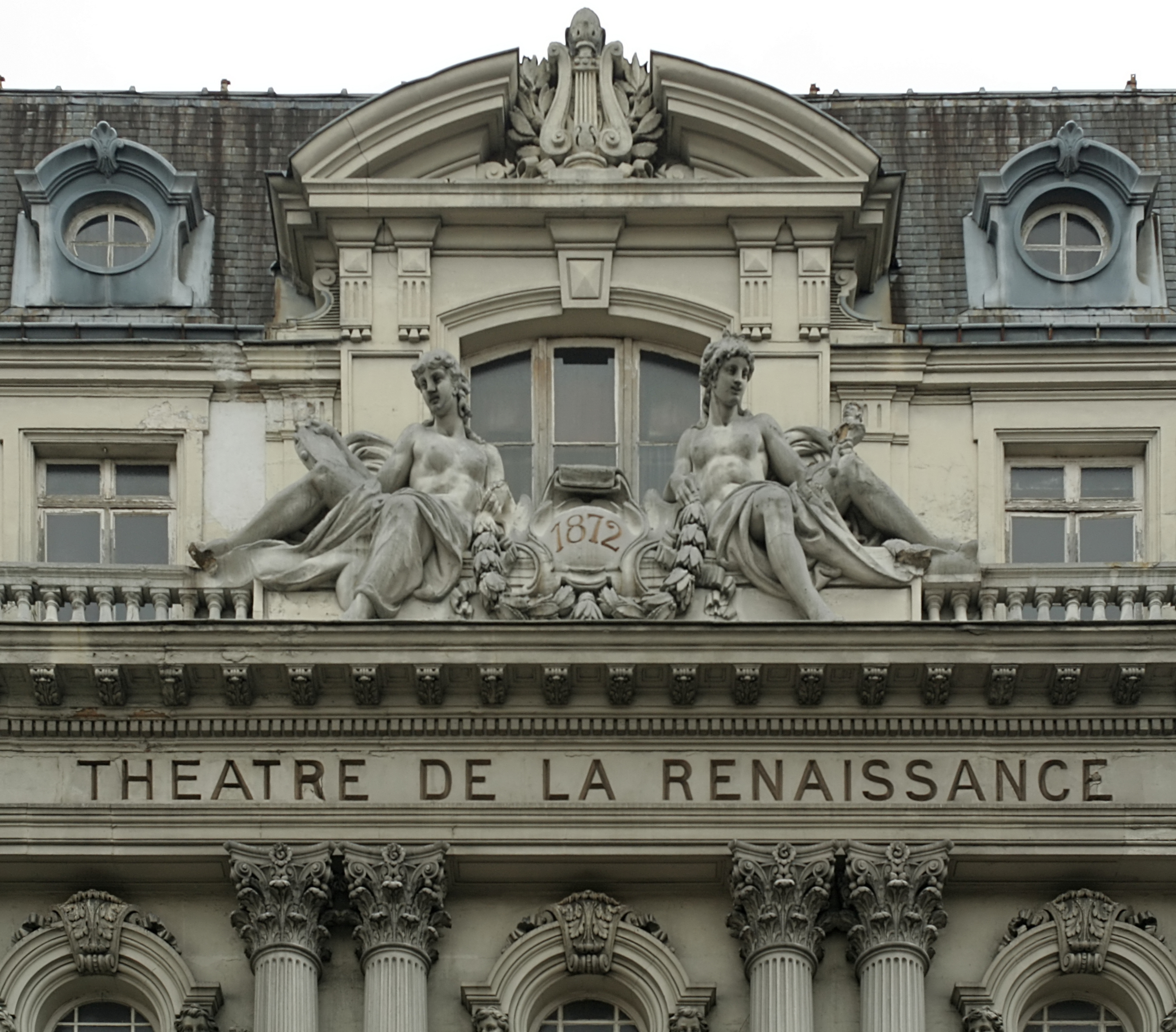 Fronton du théâtre de la Renaissance, Paris. This image was created with Hugin.